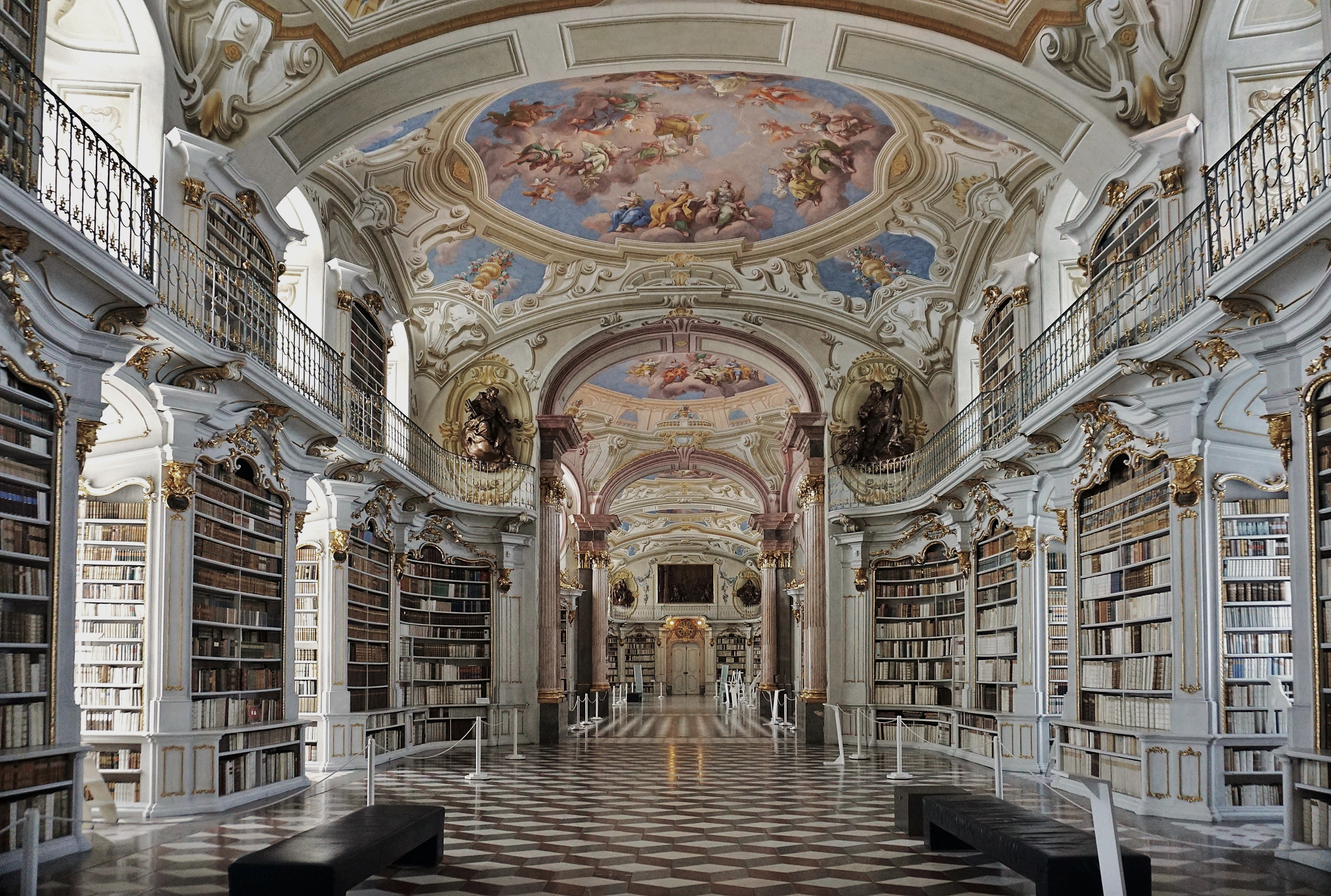 Stift Admont, Bibliothek